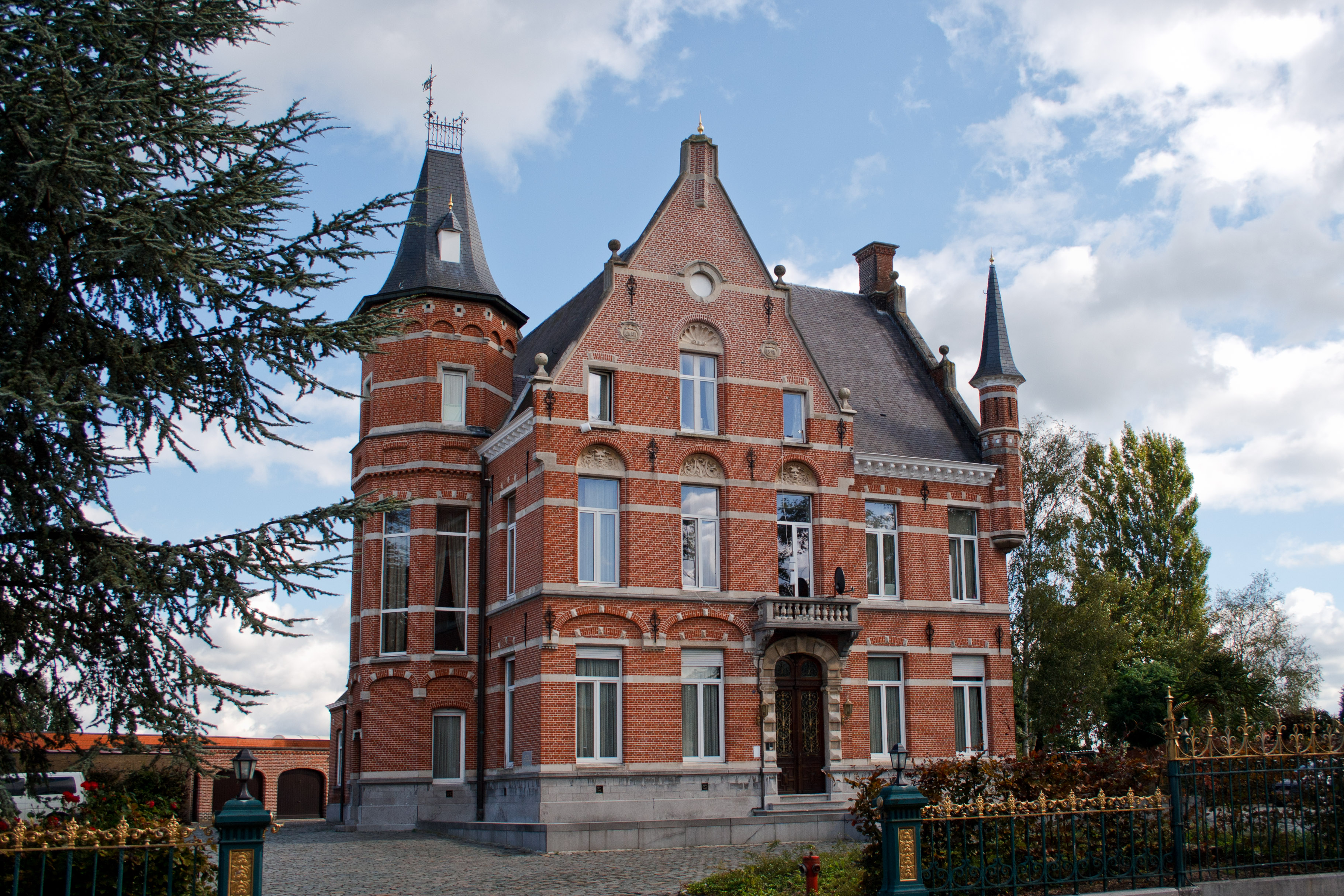 Villa 1898 Torenhof, eclectische stijl, Nieuwkerken-Waas, België